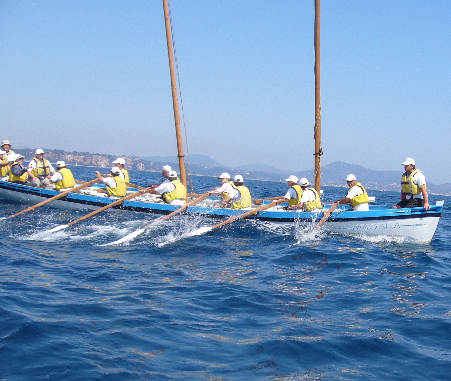 La Yole de Bantry Massalia à la Tall Ships' Race de Toulon 2007